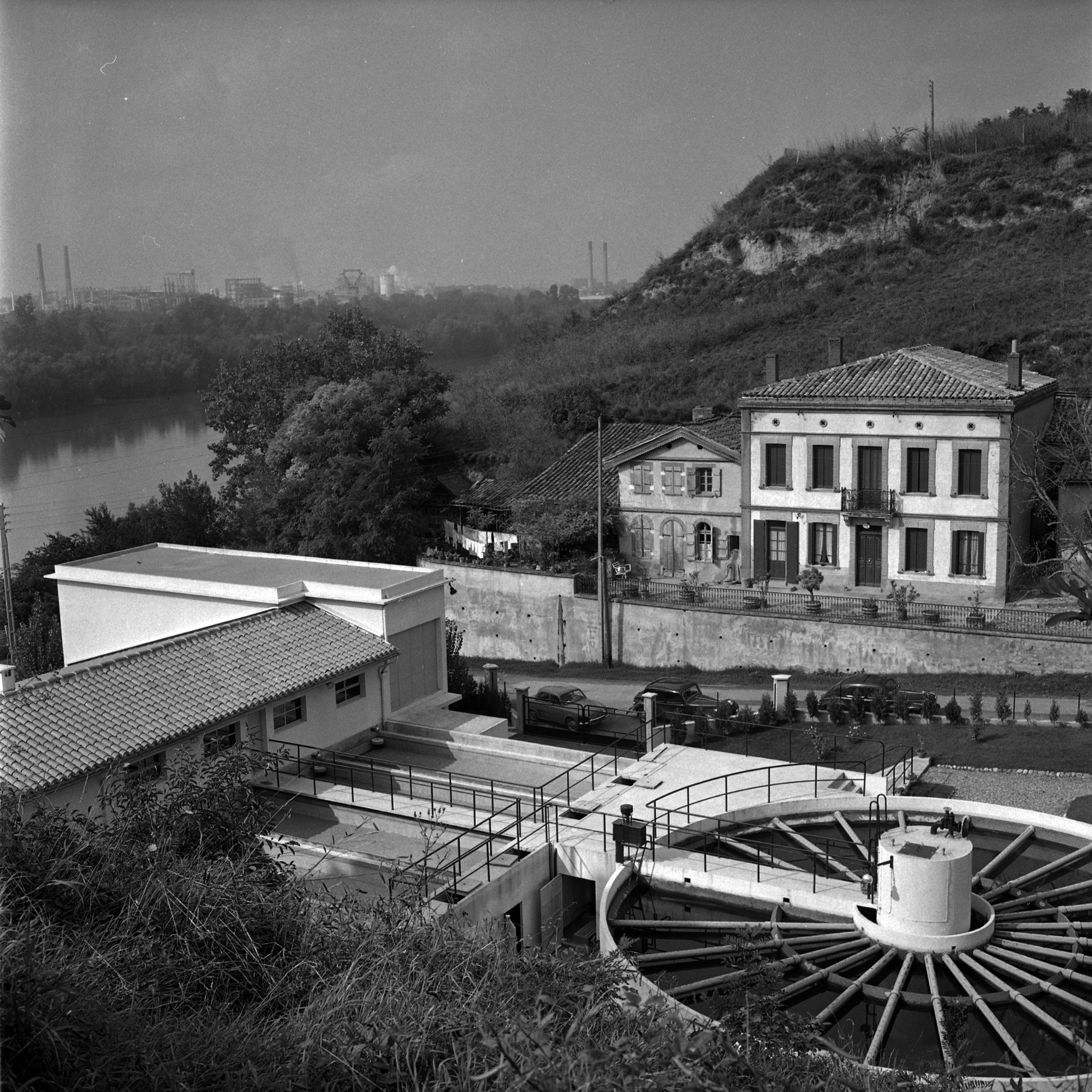 Station de pompage à Toulouse. Le 20 Septembre 1963, Vue de la station de pompage en bordure de la Garonne depuis les côteaux de Pech-David.